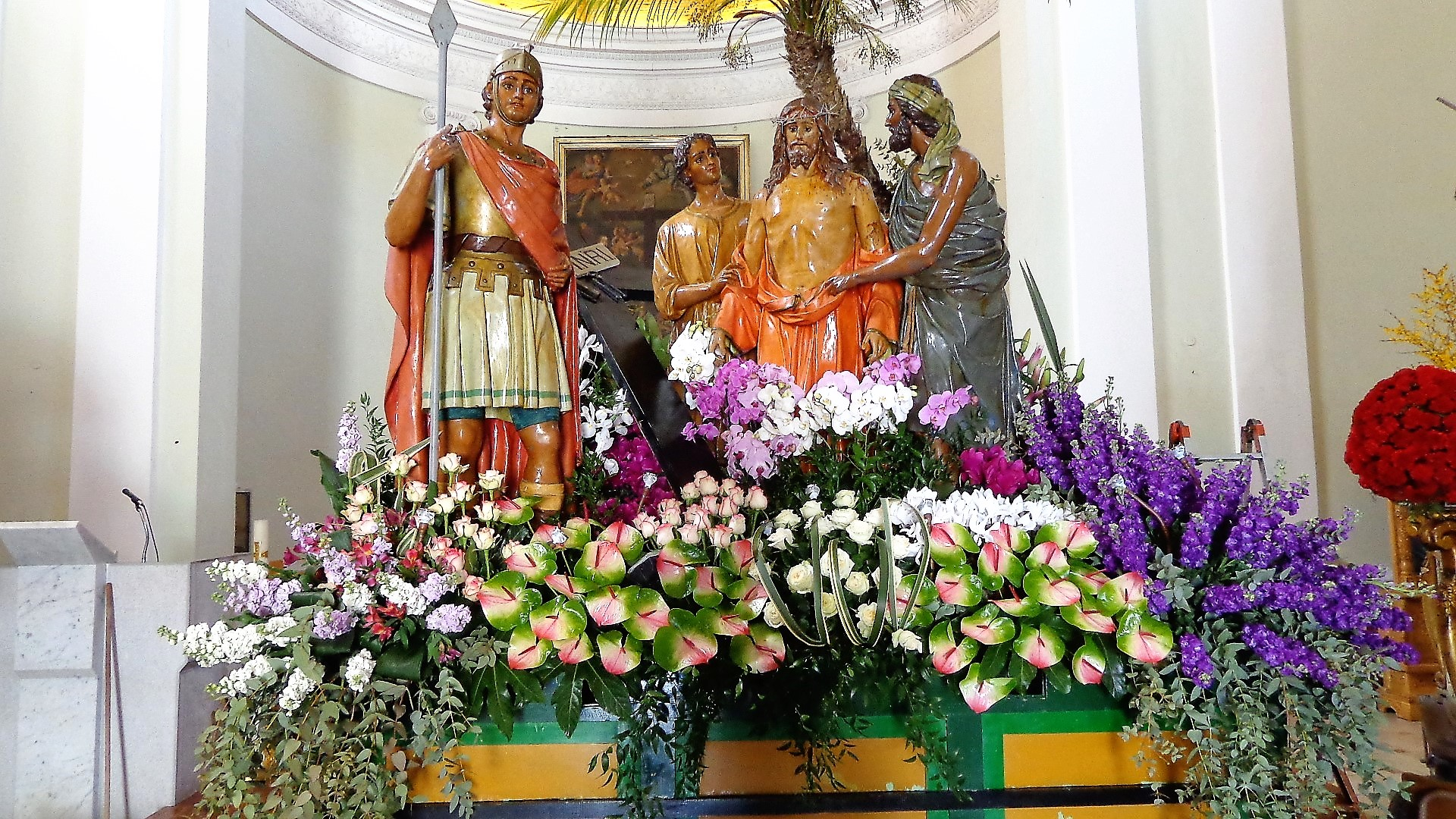 Arresto di Gesù